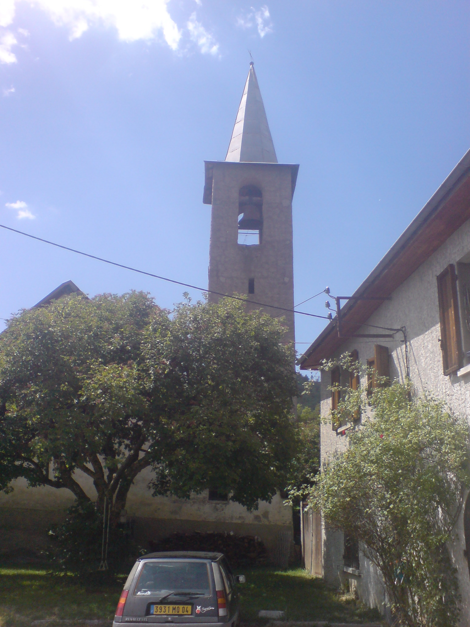 Clocher